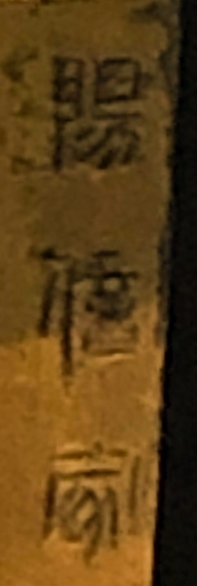 中文（中国大陆）: 长信宫灯上的铭文。